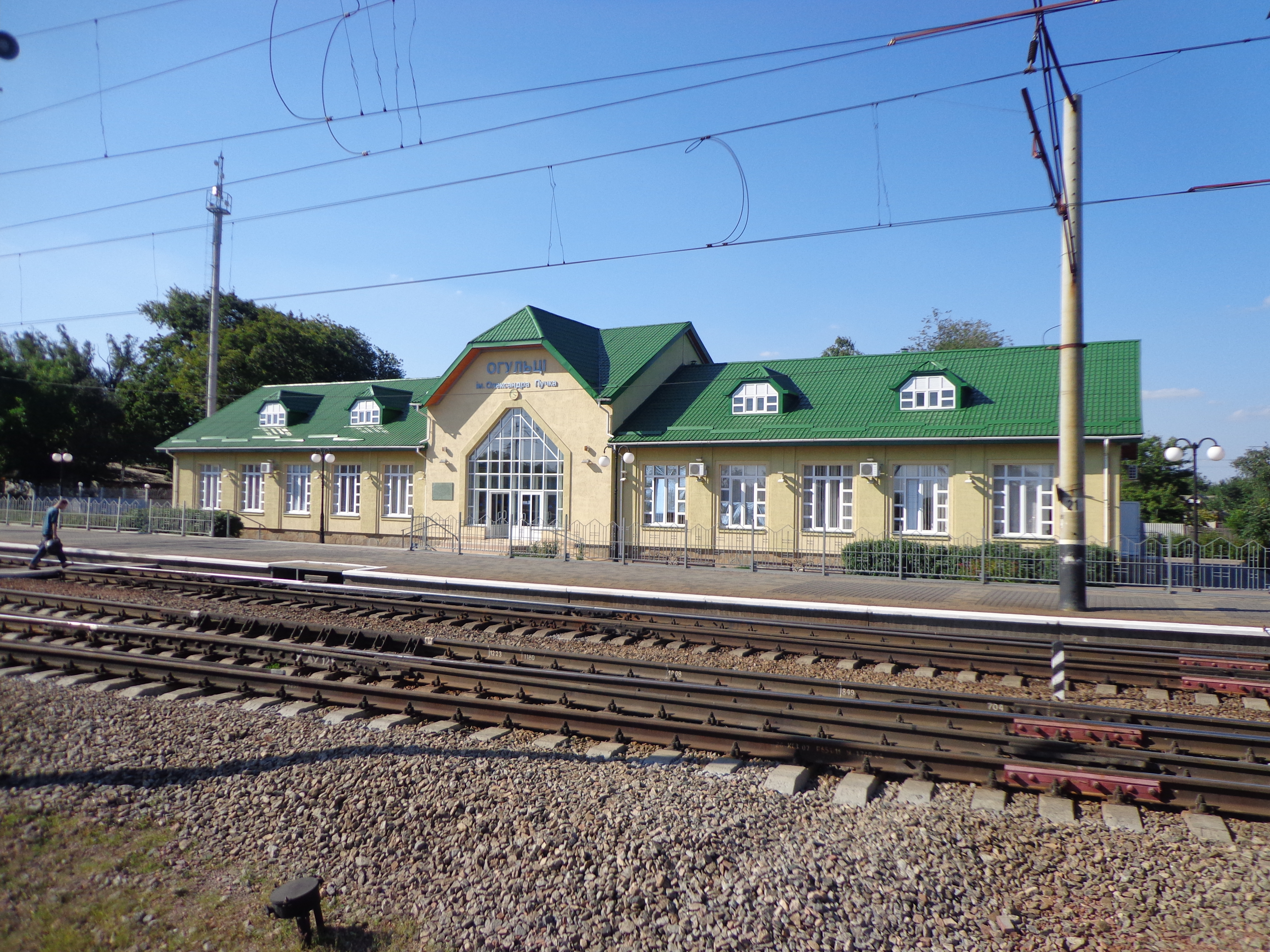 Железнодорожная станция. Село Огульцы, Валковский район, Харьковская область, Украина.